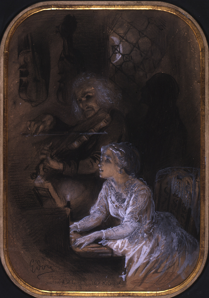 Autre titre : Antonia et le Conseiller Krespel Lavis, pierre blanche, pierre noire et rehauts de gouache blanche, sur papier 36 x 24,5 cm Achat à Samuel Clapp Fiduciary Company en 1992